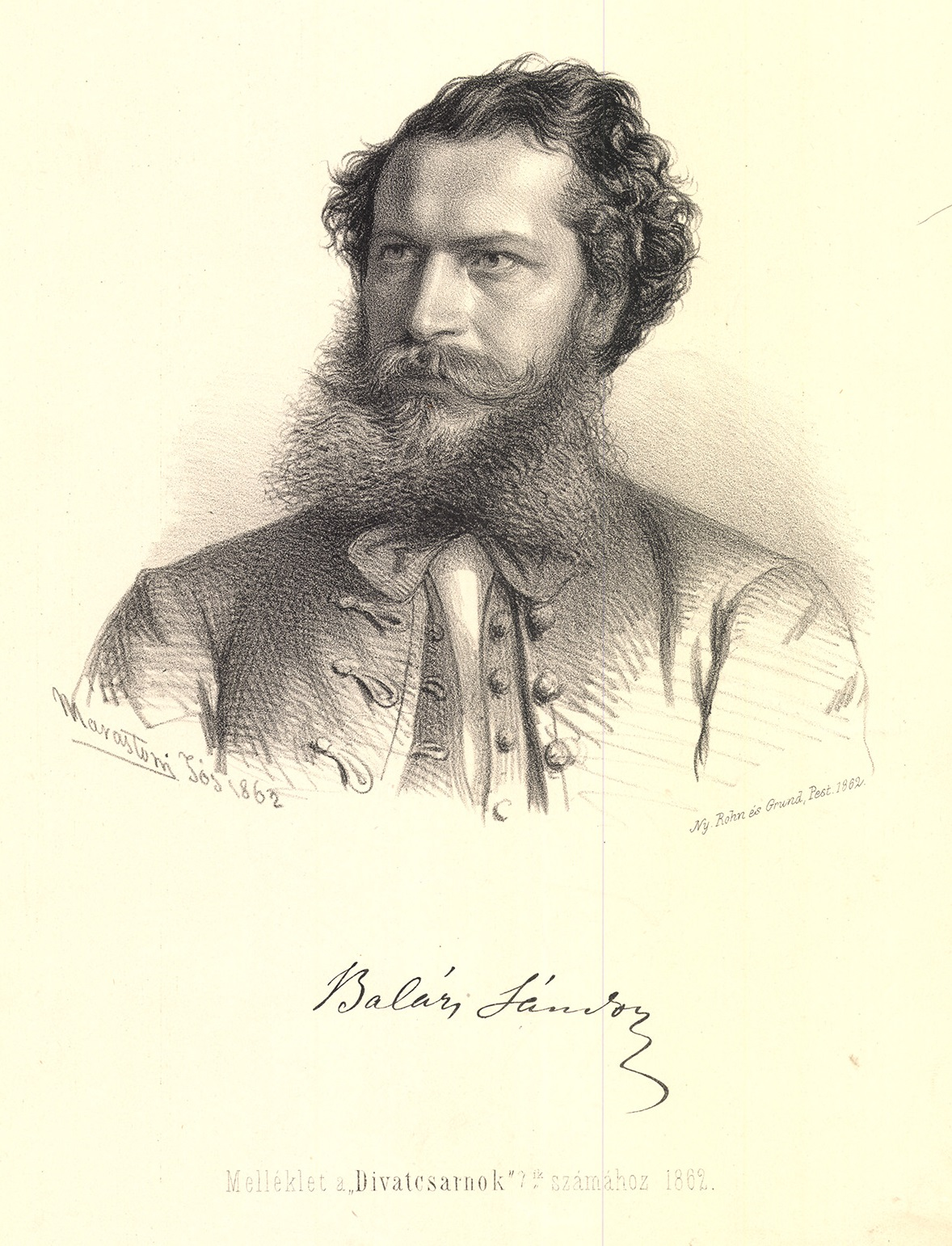 Kászonfeltízi Balázs Sándor (Kolozsvár, 1830. december 26. – Budapest, 1887. augusztus 1.) könyvtáros, író, újságíró, a Kisfaludy Társaság, a Petőfi Társaság és a Kemény Zsigmond Társaság tagja